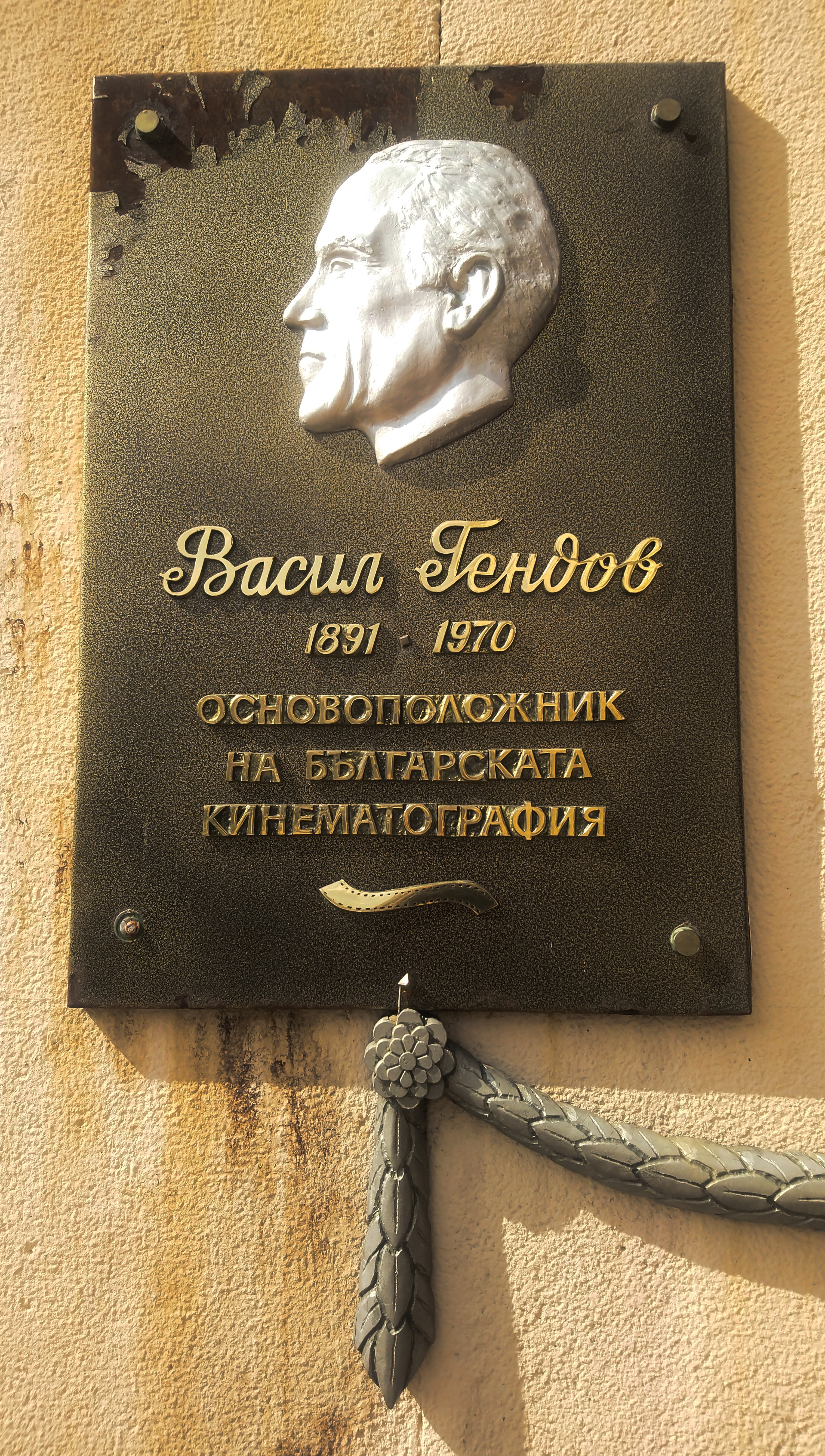 Паметна плоча на основоположника на българската кинематография Васил Гендов в центъра на Сливен